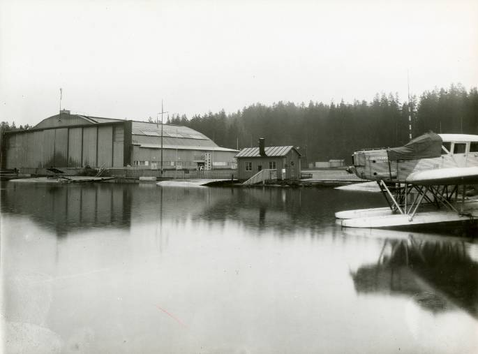 Lindarängens flyghamn